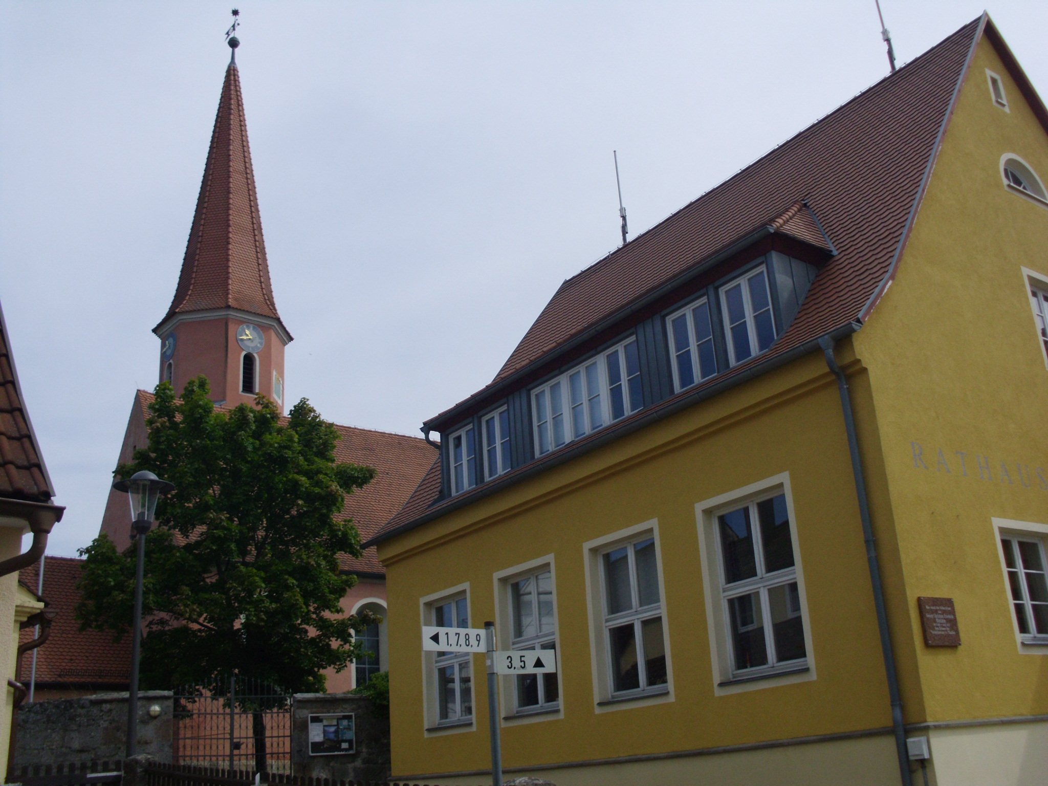 Burk (Landkreis Ansbach), Rathaus mit Gedenktafel an den Münchner Architekten Georg Friedrich Christian Bürklein